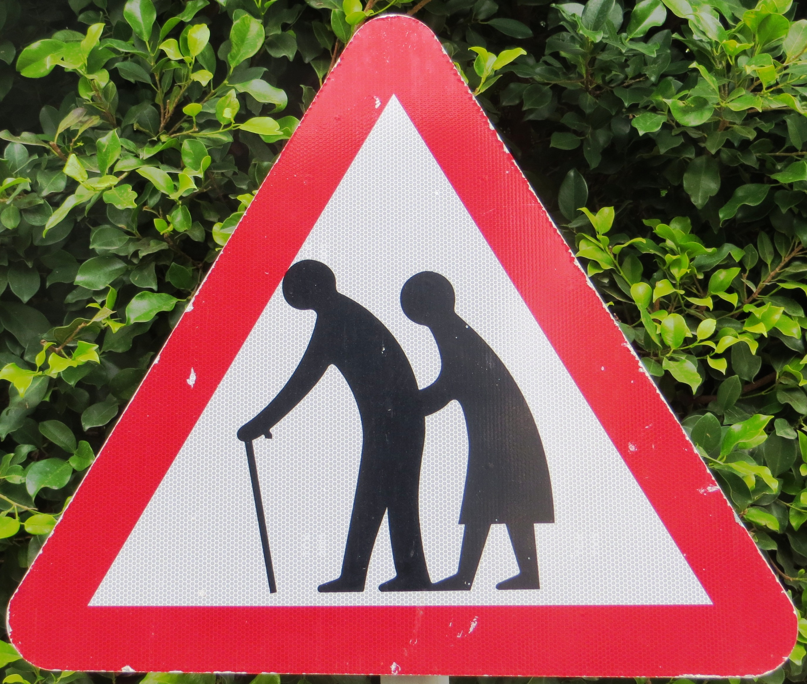 Verkeersbord: overstekende mensen